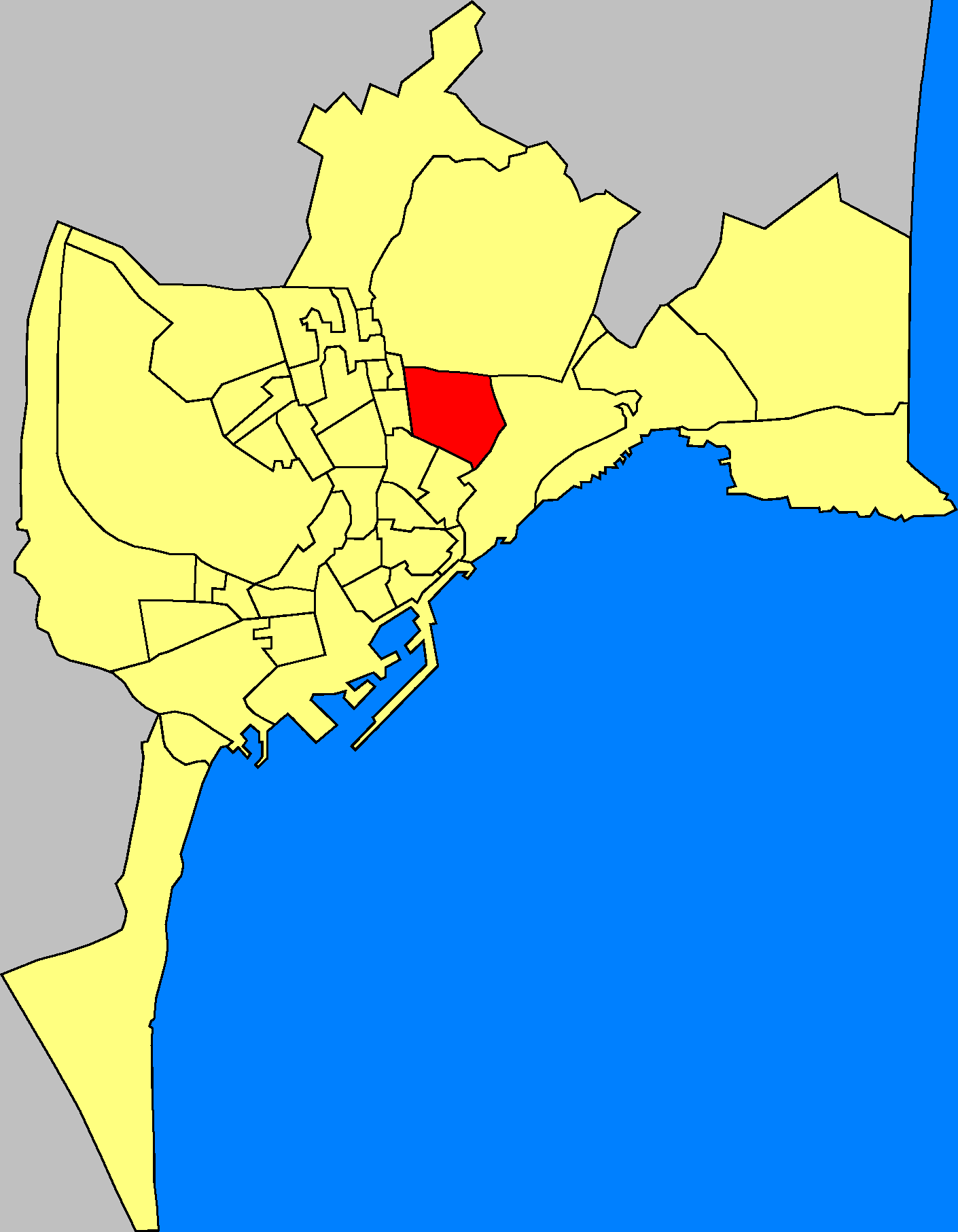 Barrios de la ciudad de Alicante